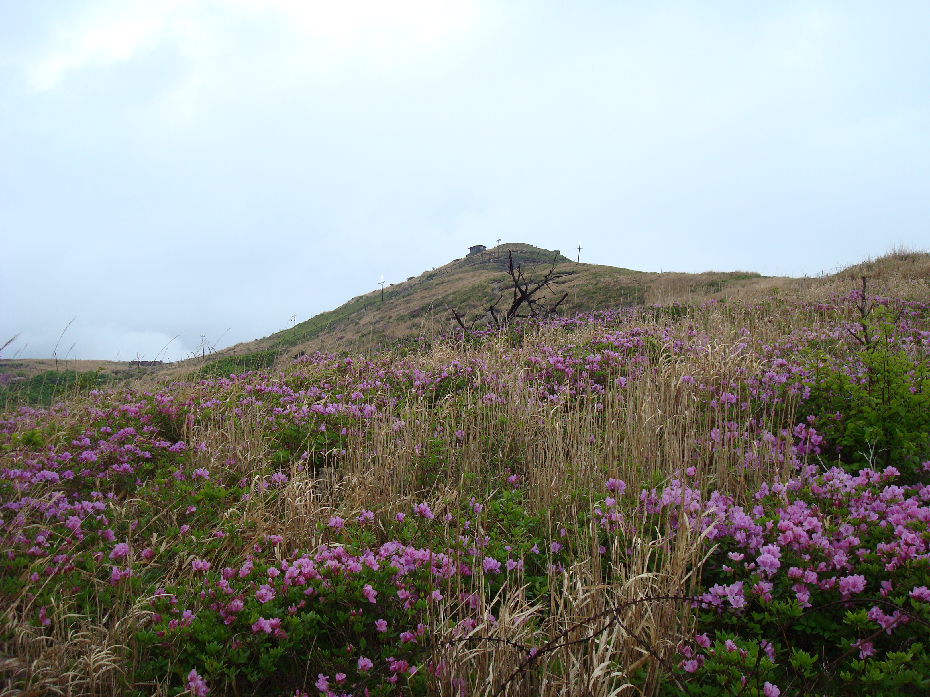 Rhododendron yedoense var. poukhanense, Mt. Cheonsung